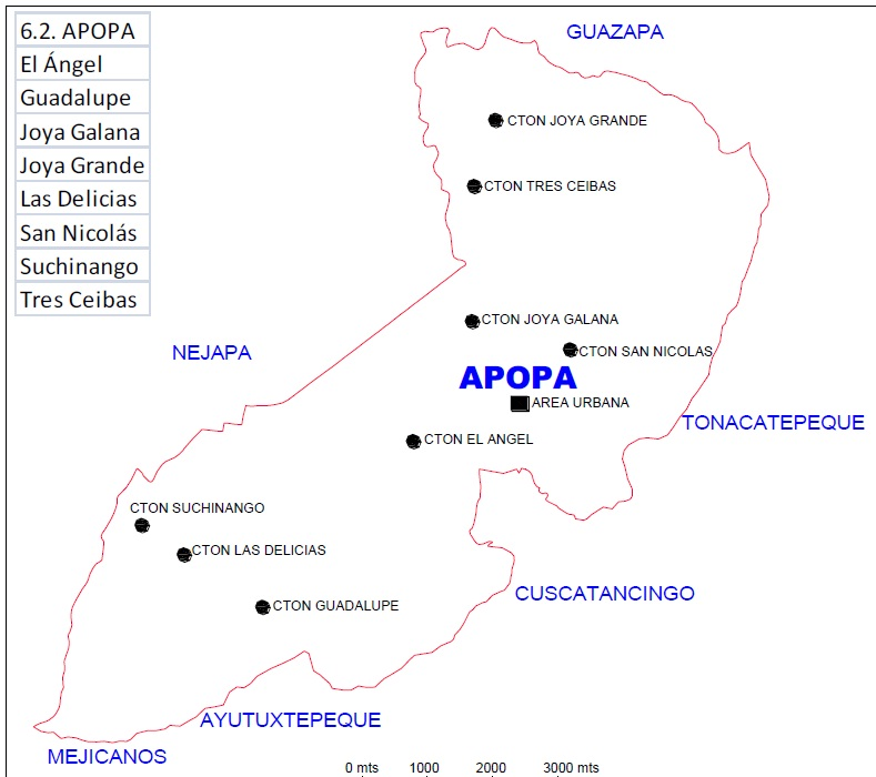 Mapa con los cantones del municipio de Apopa